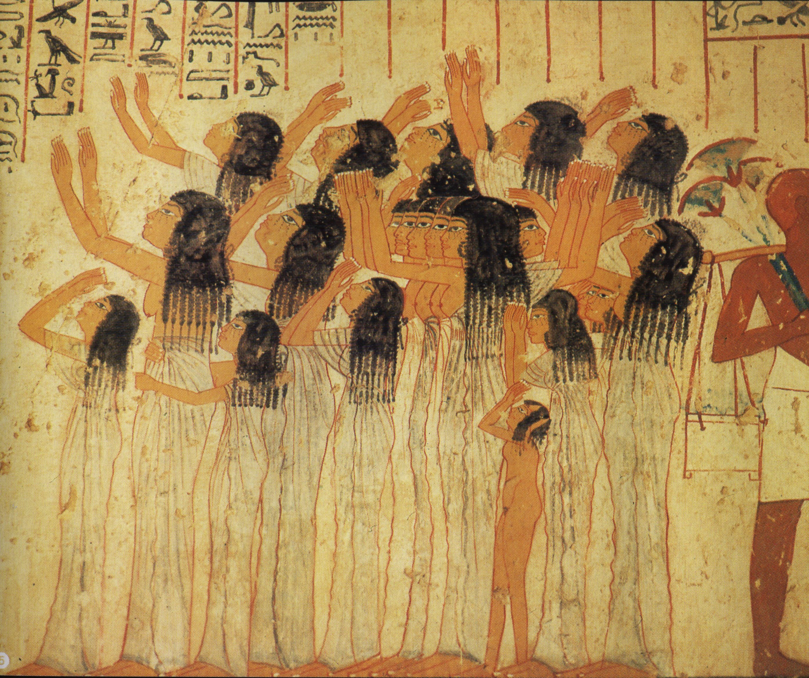 Pleureuses. Fresques figurant dans la tombe du Ramose, XVIIIem Dynastie.